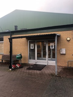 Skanör-Falsterbo Tennisklubb